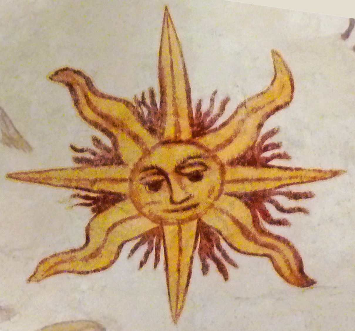 Fresque du plafond (détail) de l'église Saint-Jean-Baptiste de Larbey